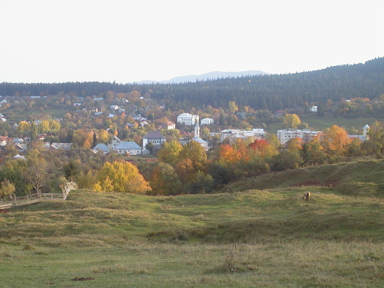 Solca - Vue générale 2002 Viteazul